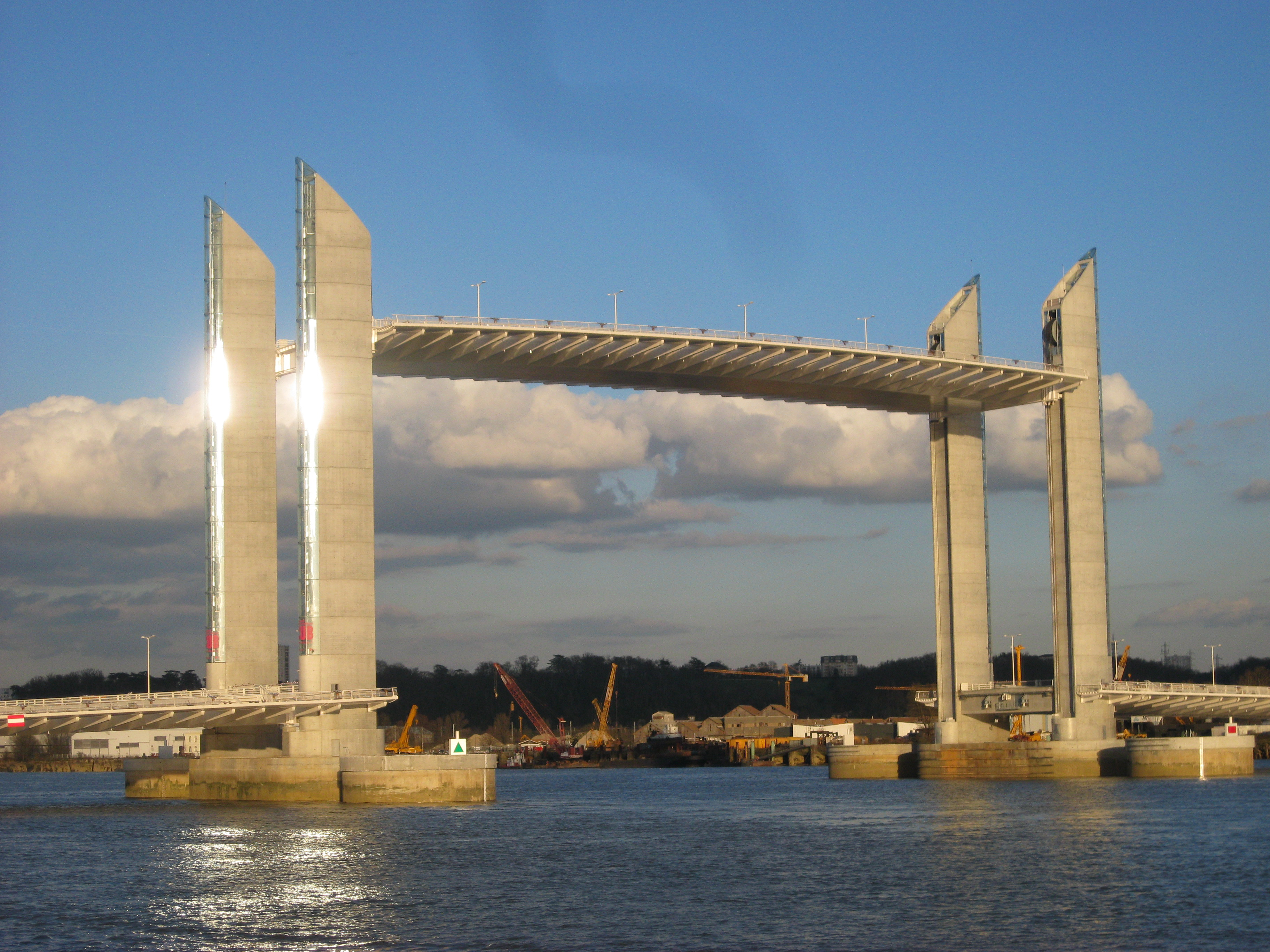 Le pont Jacques-Chaban-Delmas levé à Bordeaux, le 15 mars 2013 (jour de son inauguration).